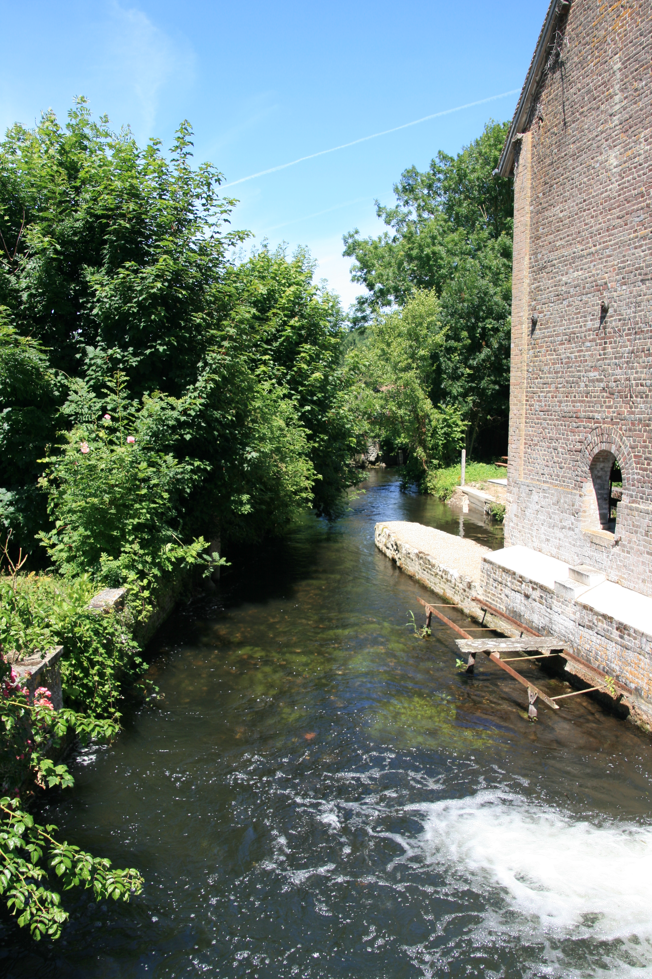 L'Iton, à Acquigny (Eure, France), vu par la rue Aristide Briand.